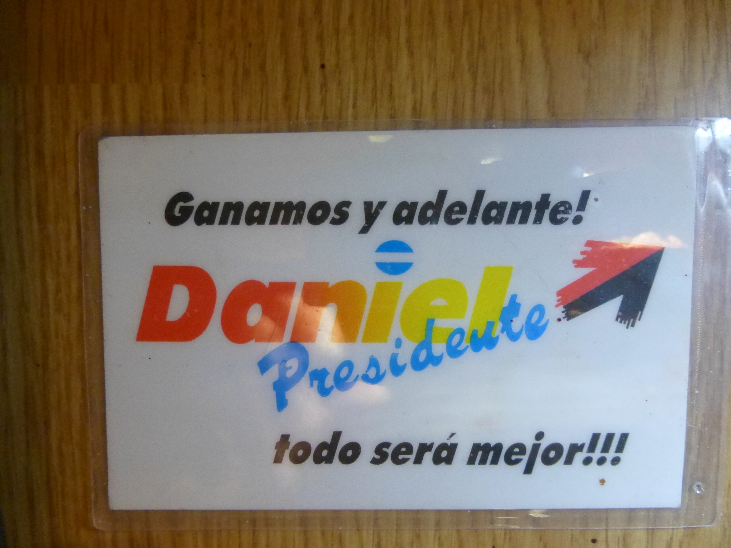 Propaganda electoral del FSLN (Frente Sandinista de Liberación Nacional) de Nicaragua para las elecciones presidenciales de 1990.